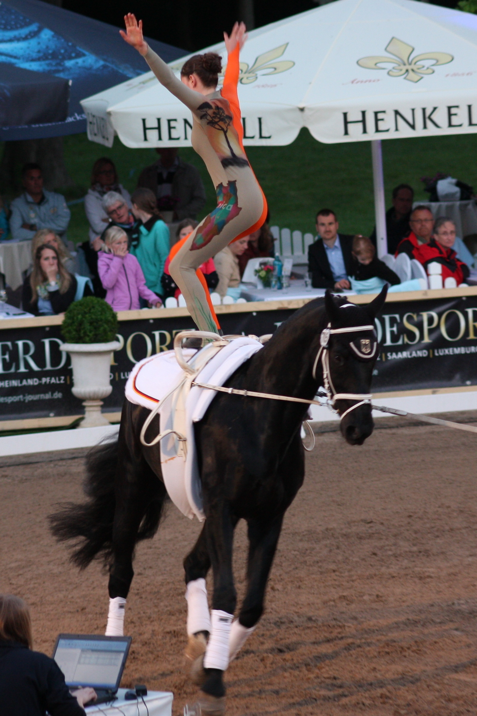 77. Internationales Pfingstturnier Wiesbaden 2013, CVI *** Voltigieren, Theresa-Sophie Bresch mit Cyrano Personality rights warning Although this work is freely licensed or in the public domain, the person(s) shown may have rights that legally restrict certain re-uses unless those depicted consent to such uses. In these cases, a model release or other evidence of consent could protect you from infringement claims.